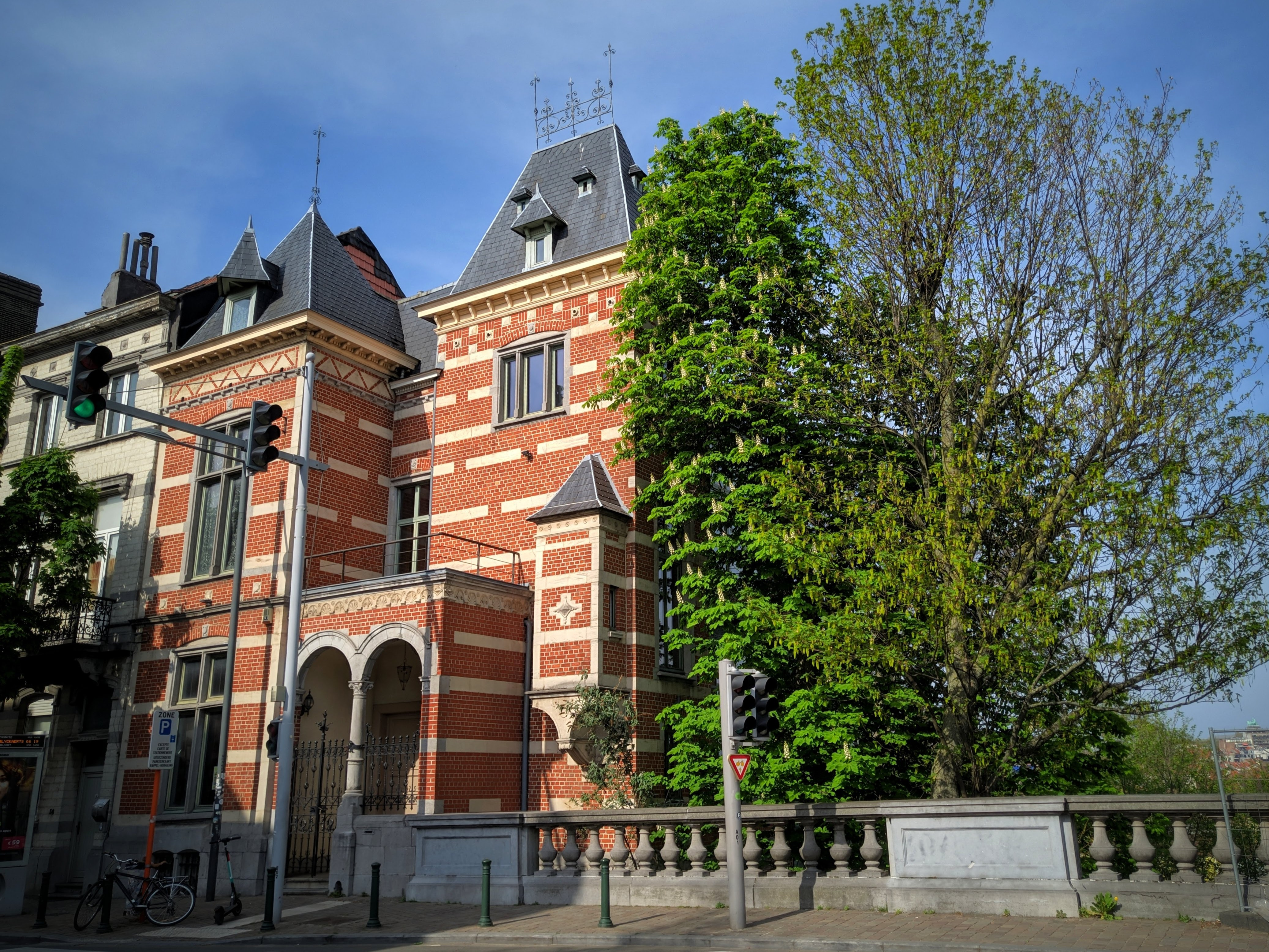 Façade principale du bâtiment au 40, avenue de la Couronne. Photo prise depuis le trottoir opposé sur l'avenue de la Couronne.